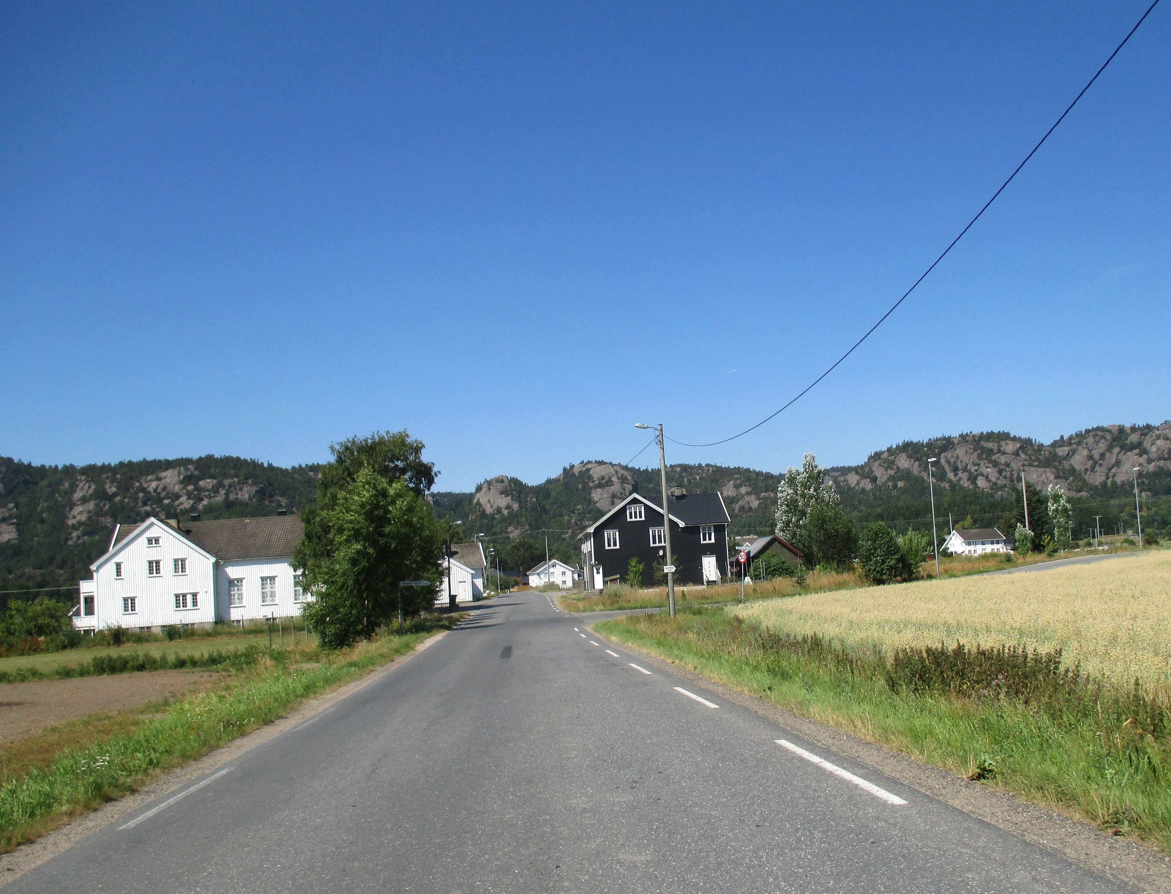 Reddalsveien (FV31) i Reddal